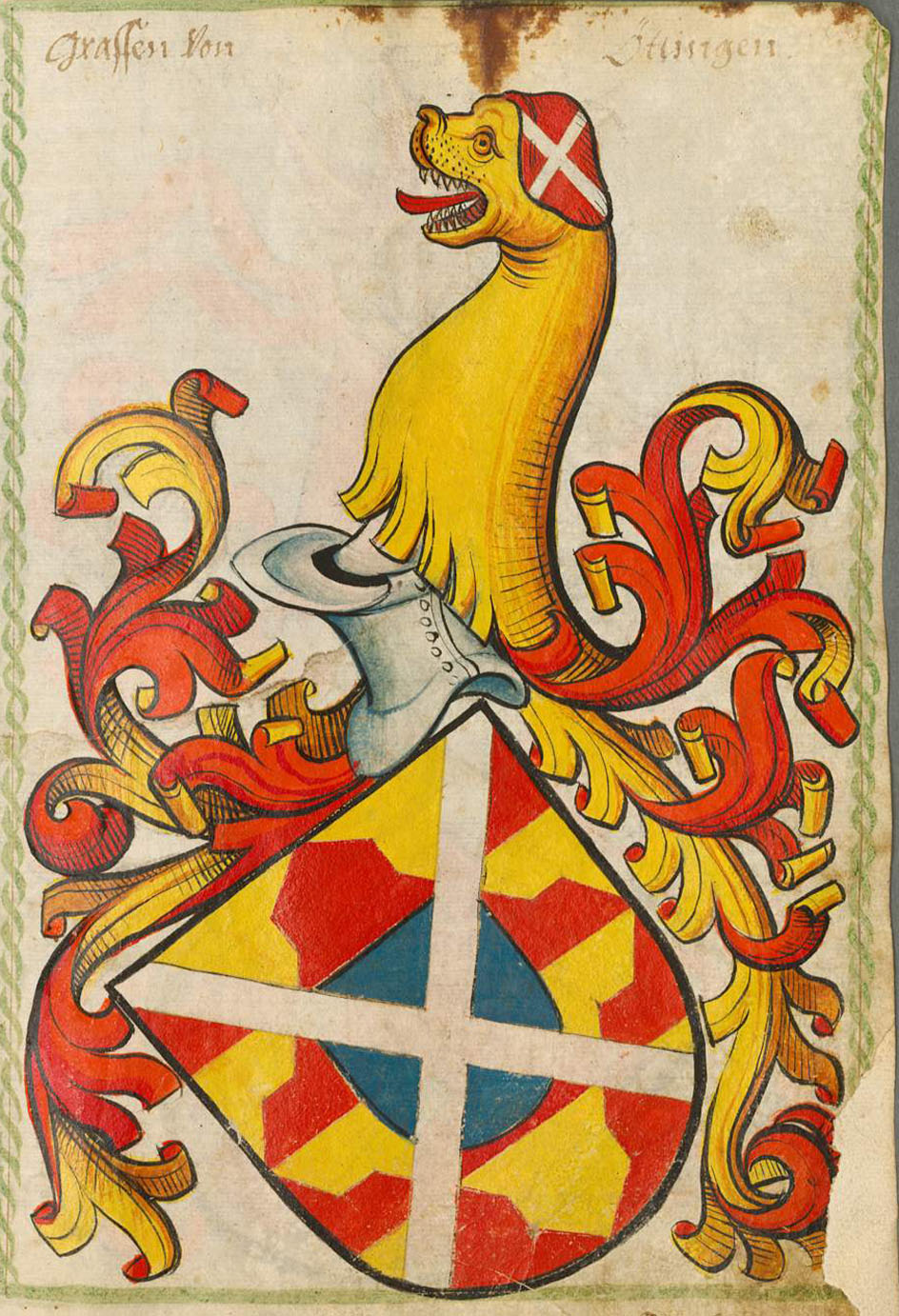 Scheibler'sches Wappenbuch, älterer Teil Oettingen